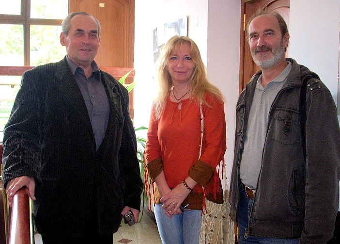 Ivo Mička, spisovatelka Monika Pokorná a řezbář Emil Pejša (foto Jiří Pokorný)